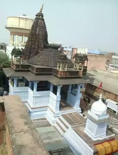 करौली की नींव के पत्थर का साक्षी ऐतहासिक मन्दिर